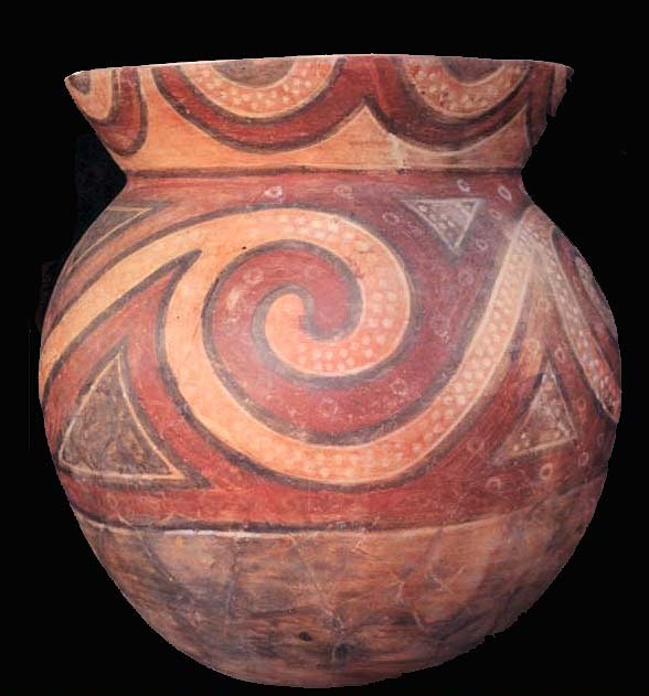 Vasija ceremonial de Huaca Pucllana.